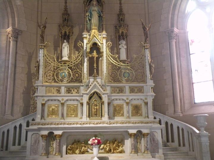 La Basilica por dentro, donde las personas piden sus intenciones